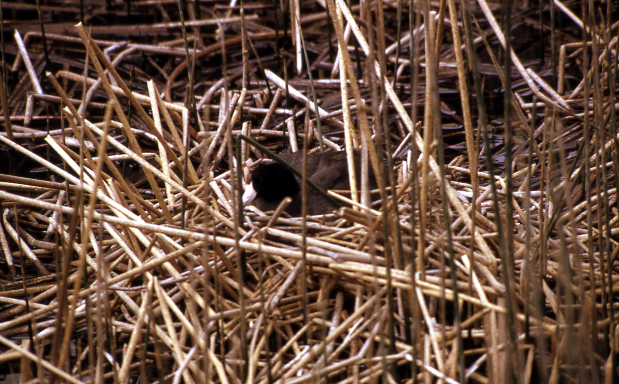 nesting american coot (Fulica americana)